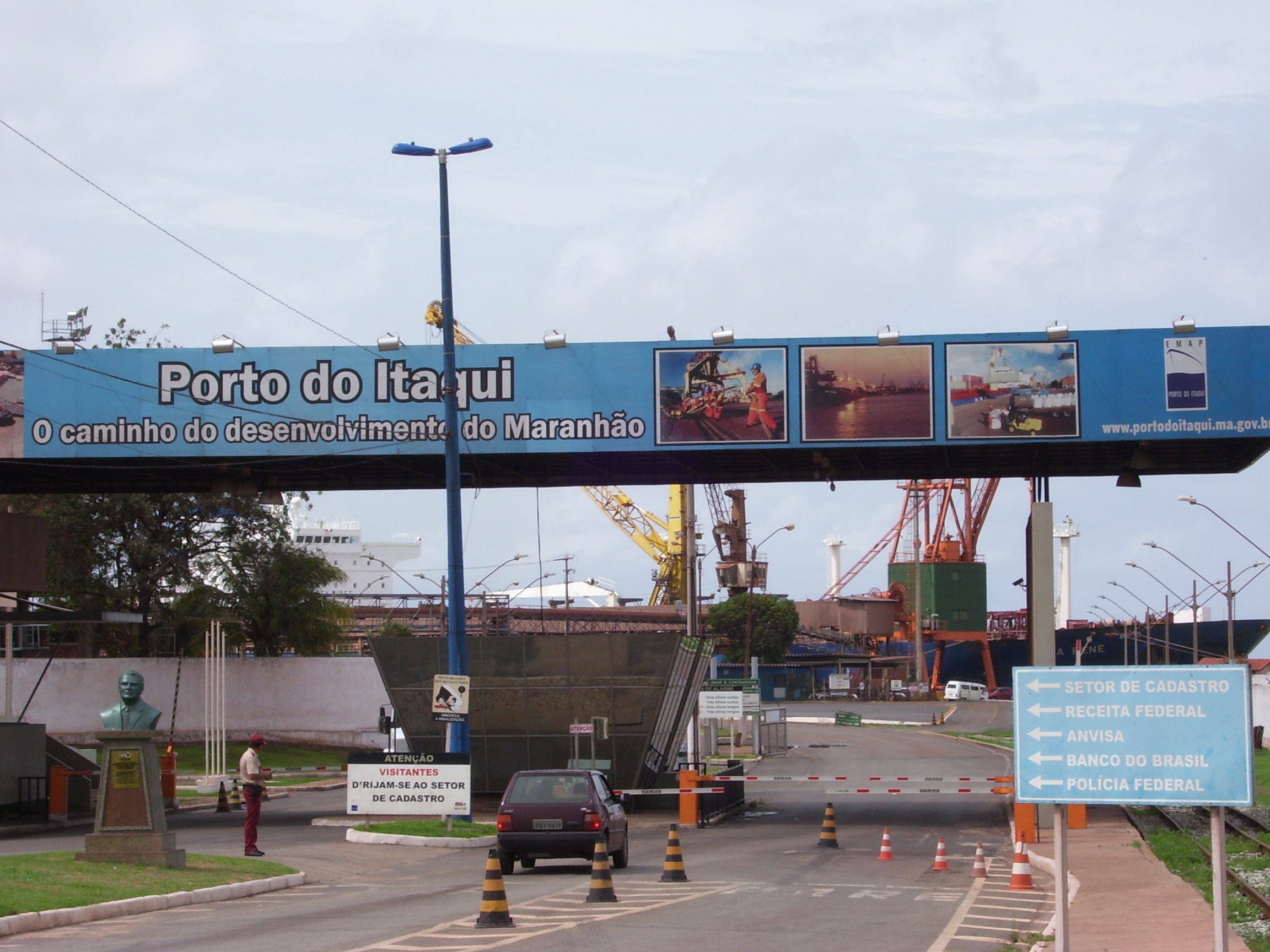 Entrada do Porto do Itaqui, Maranhão, Brasil